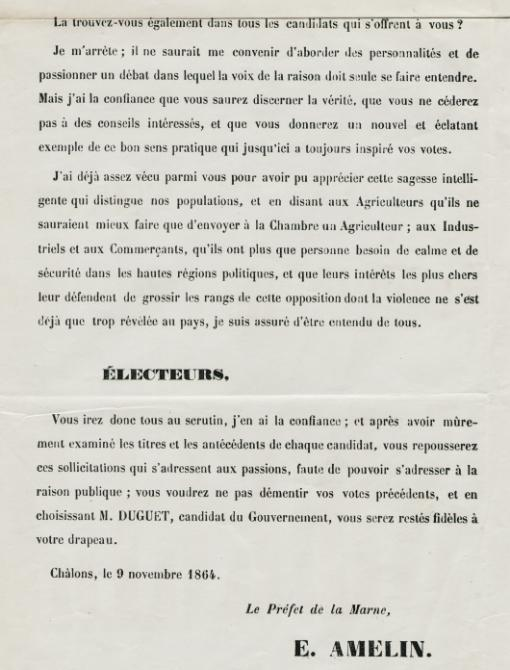 Proclamation du préfet Eugène Amelin - page 2